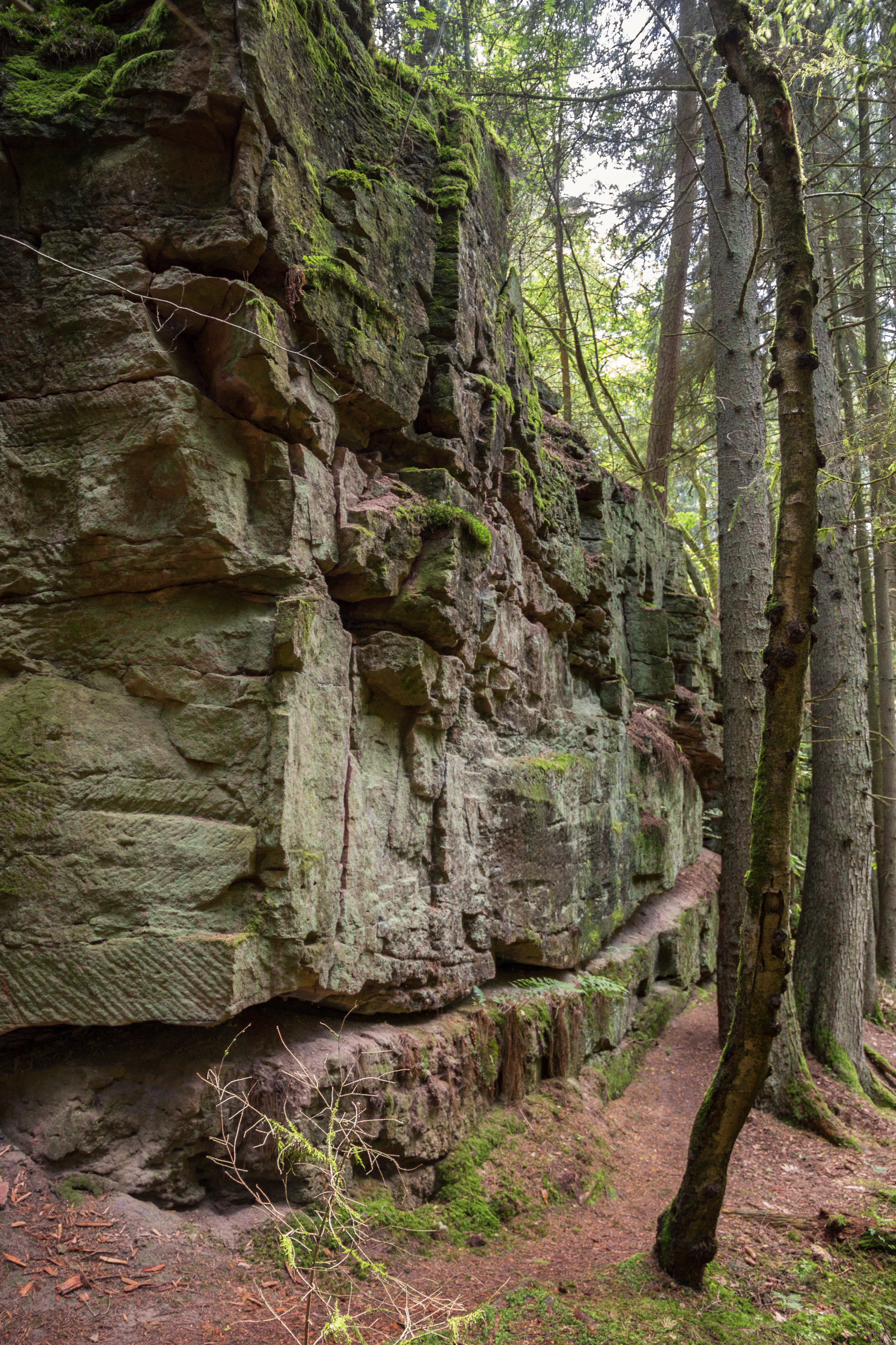 Steinbrüche bei Wendelstein, Wernloch, LSG Schutz des Landschaftsraumes im Gebiet des Landkreises Roth - "Südliches Mittelfränkisches Becken östlich der Schwäbischen Rezat und der Rednitz mit Vorland der Mittleren Frankenalb" (LSG Ost), FFH-Gebiet, Kornberge bei Worzeldorf, Vogelschutzgebiet, Nürnberger Reichswald